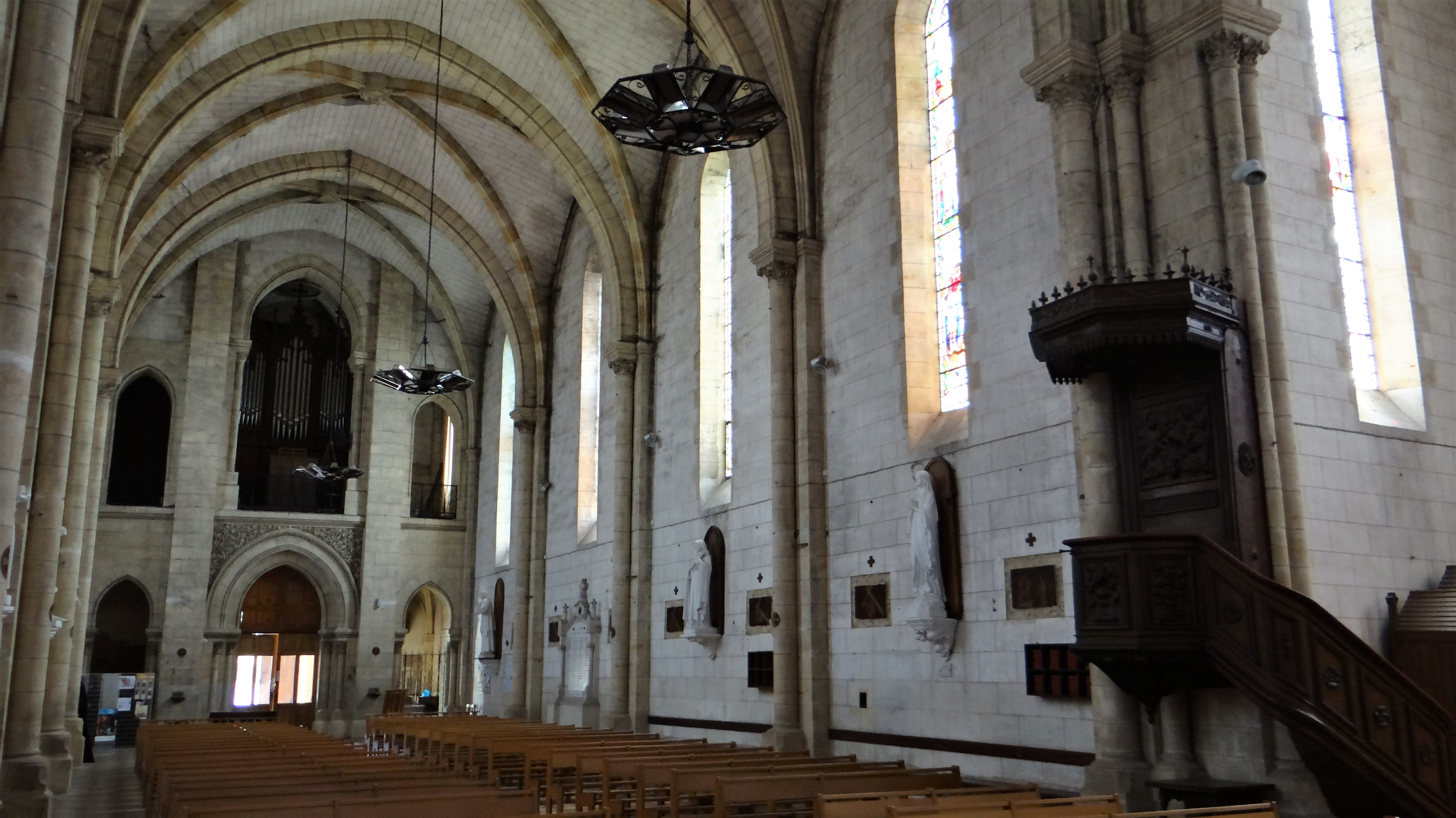 Le Bugue - Église Saint-Sulpice - Nef, chaire et tribune d'orgue